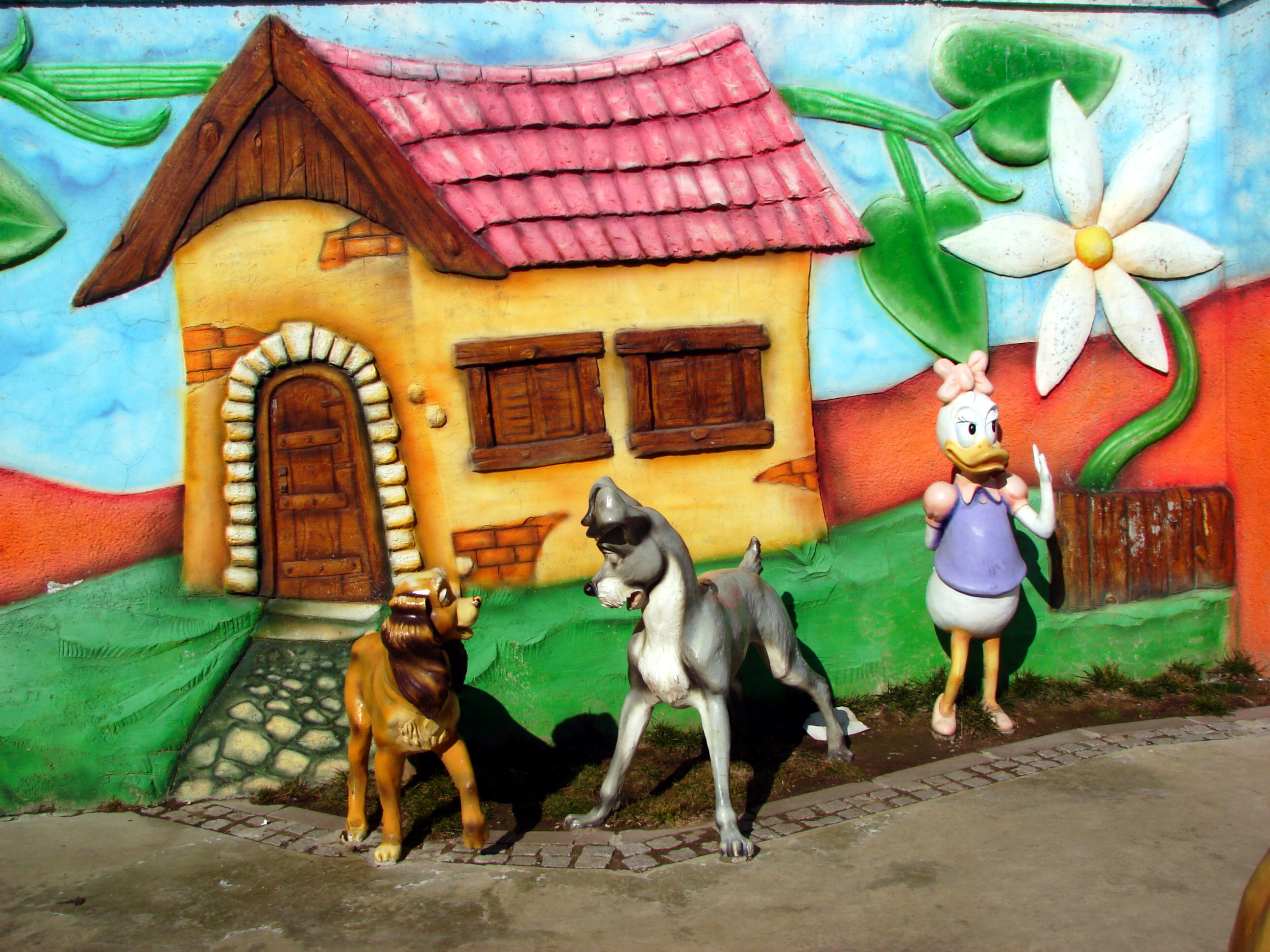 Ankara Amusement Park